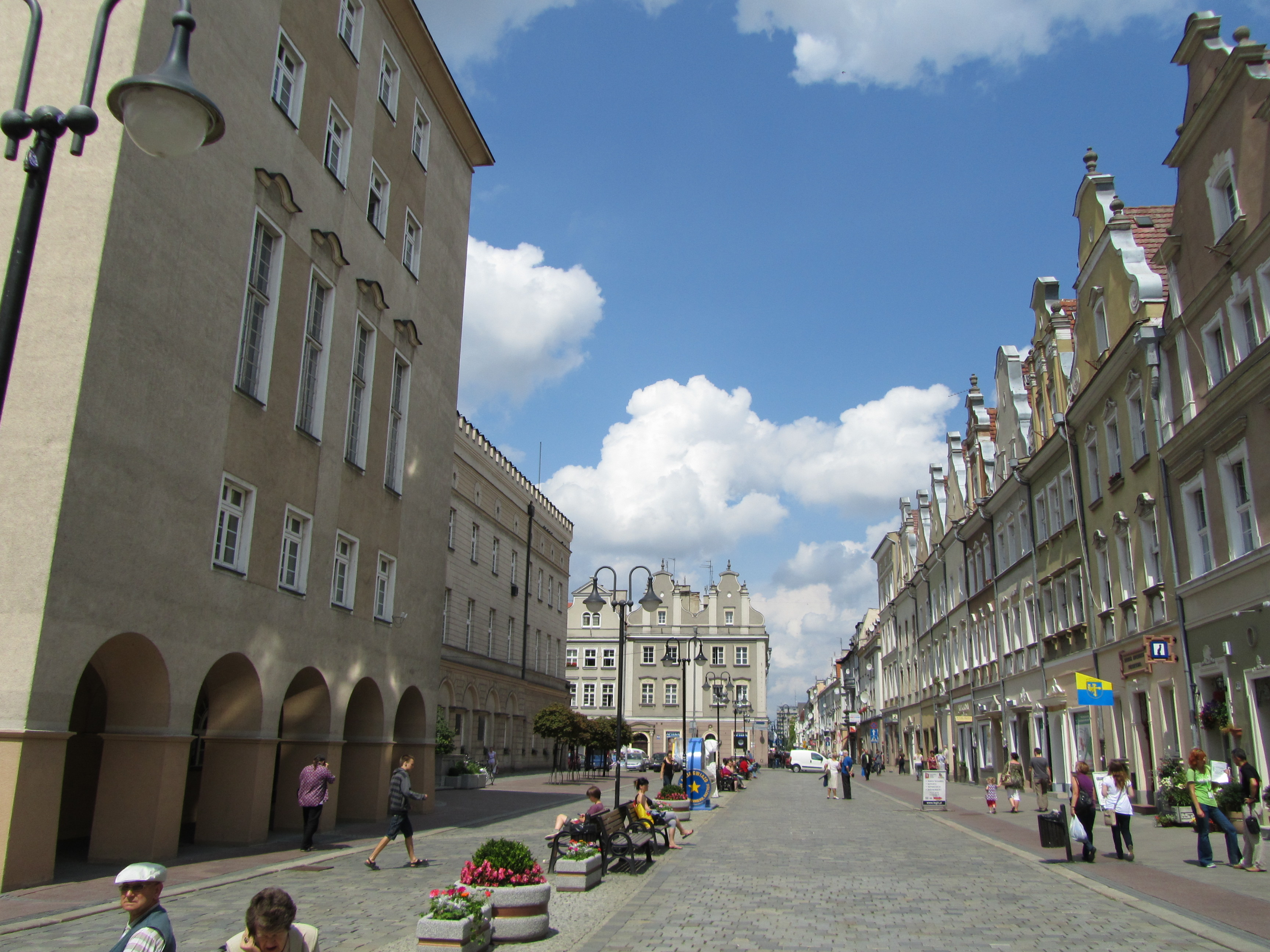 Der Ring in oppeln